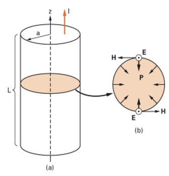 ilustração para entendimento do teorema de poynting